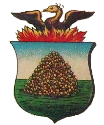 Brasão do município de Cuiabá de 1727.